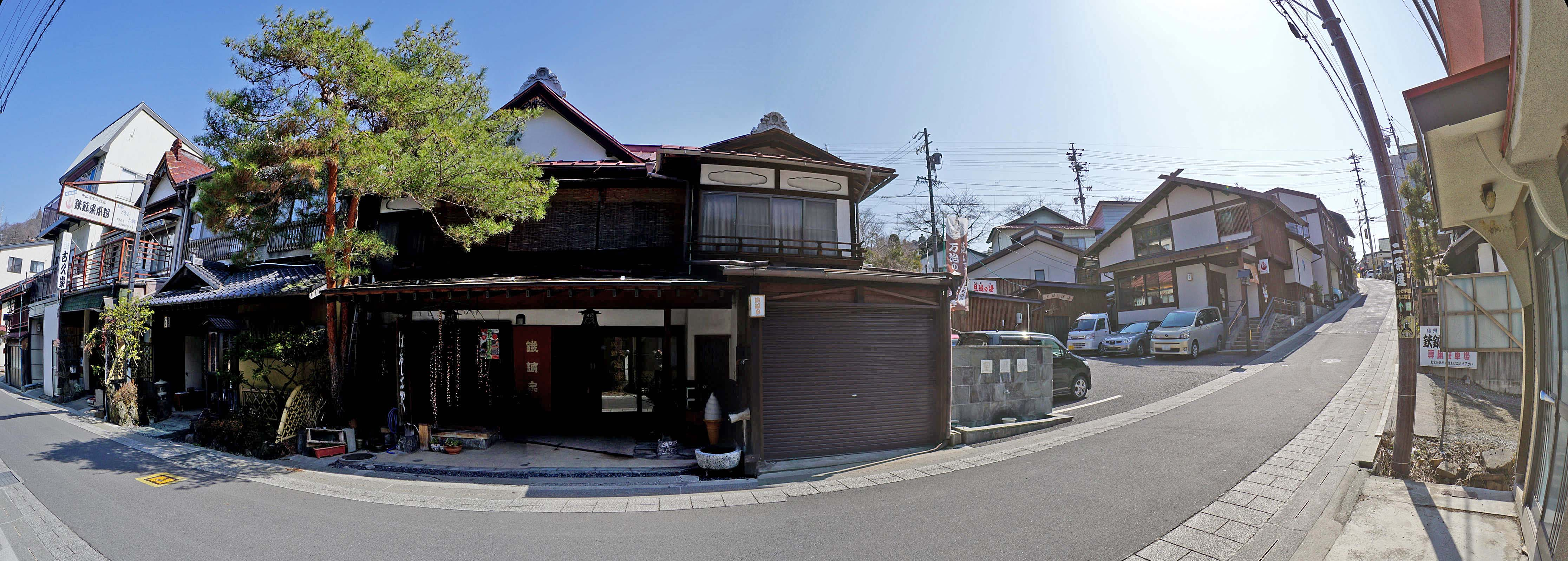 Tekkosen honkan , 鉄鉱泉本館